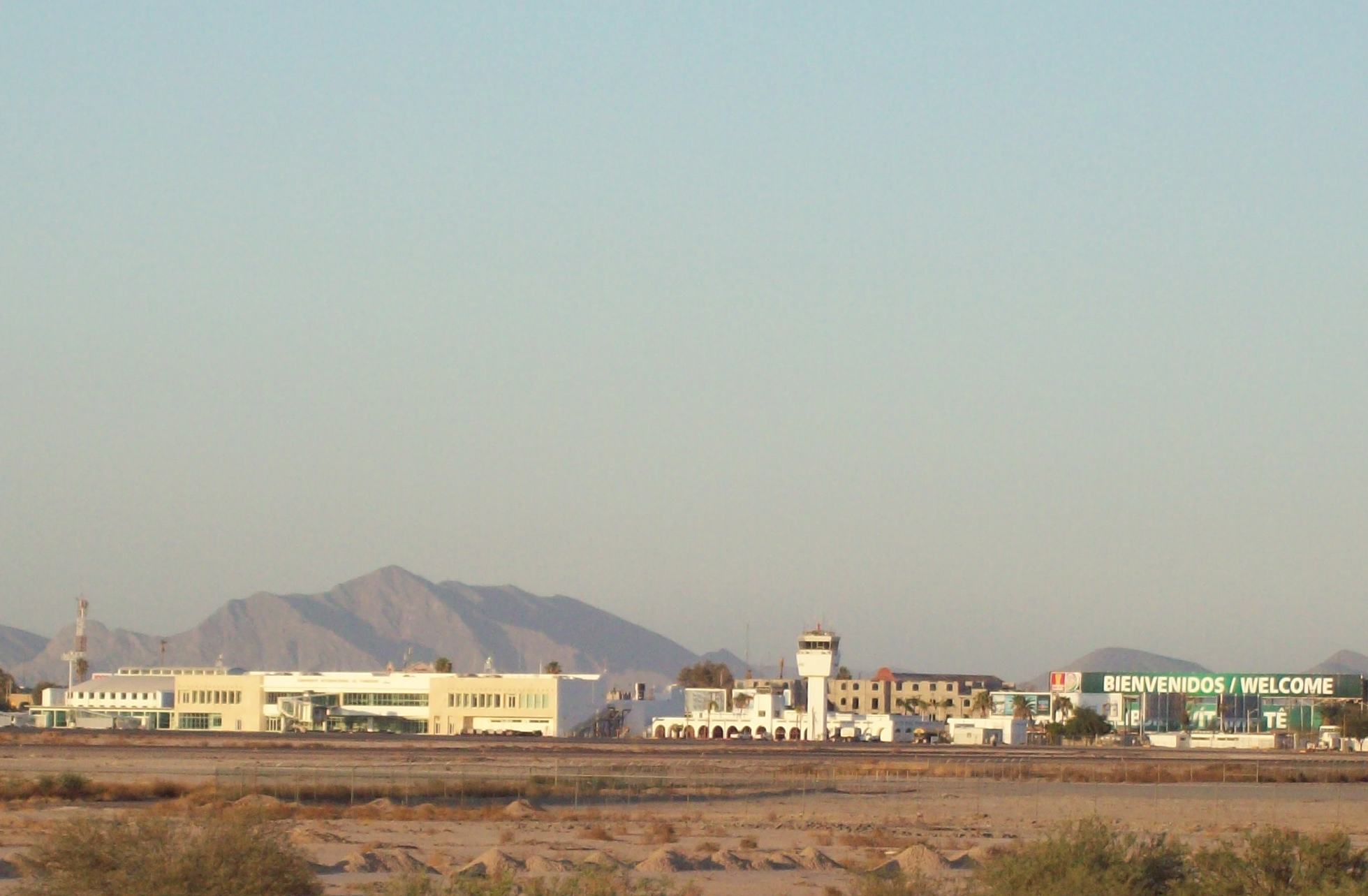 vista de la terminal aérea del aeropuerto de Torreón, Coah